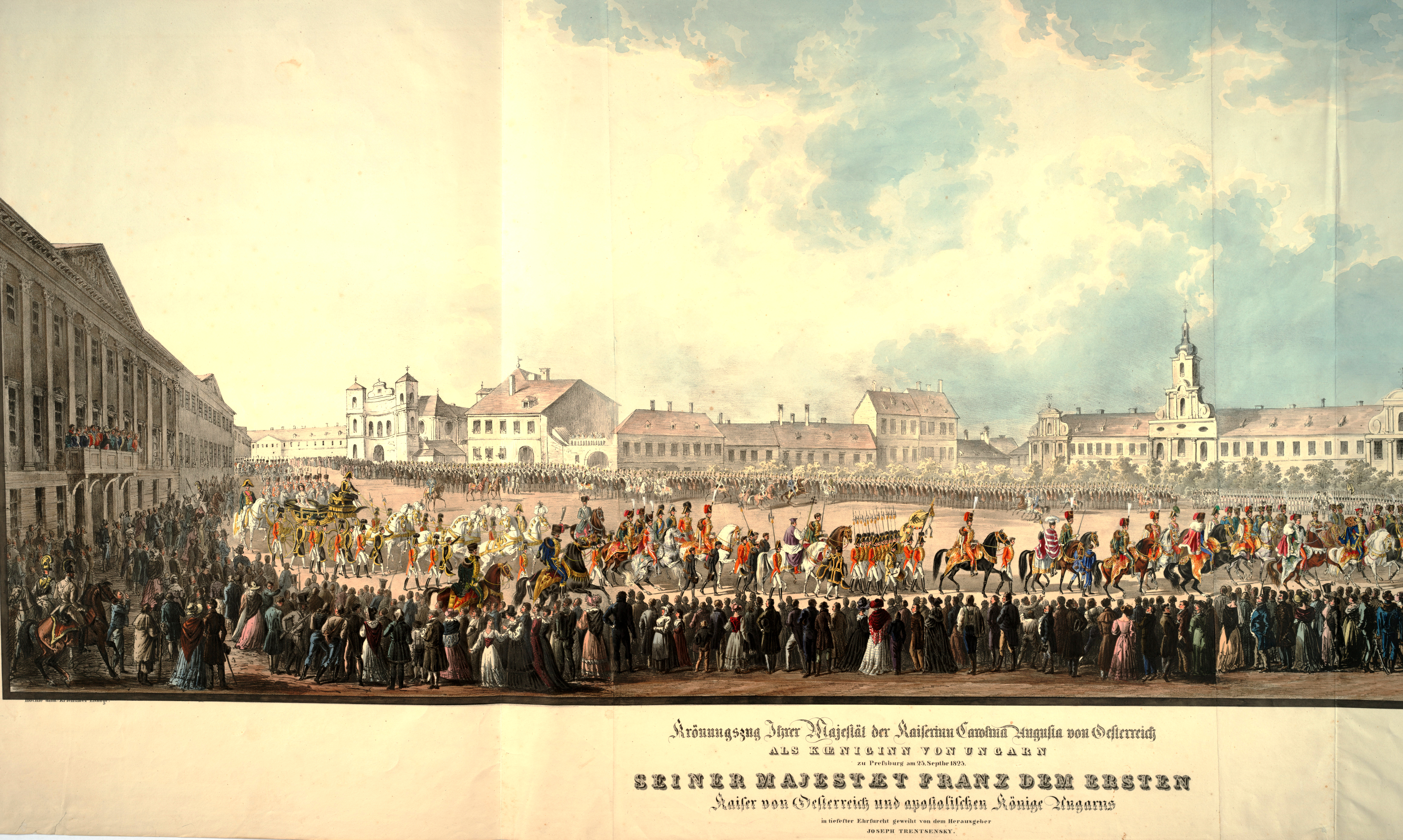 Krönungzug ihrer Majestät der Kaiserinn Carolina Augusta von Oesterreich als Koeniginn von Ungarn zu Pressburg am 25. Septbr. 1825